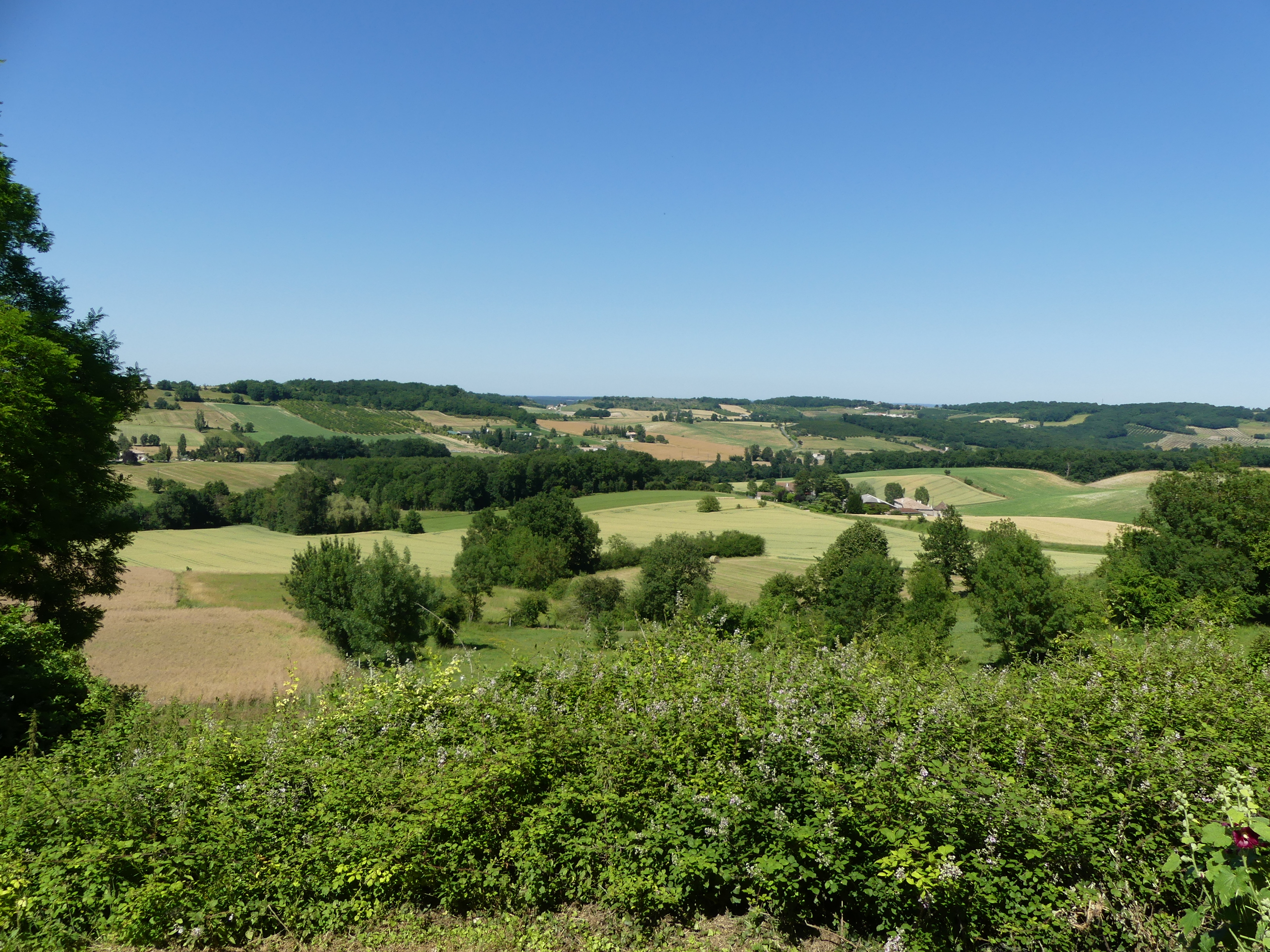 Vue sur le vallon de la Mascarde depuis le bourg de Castelnaud-de-Gratecambe, Lot-et-Garonne, France.